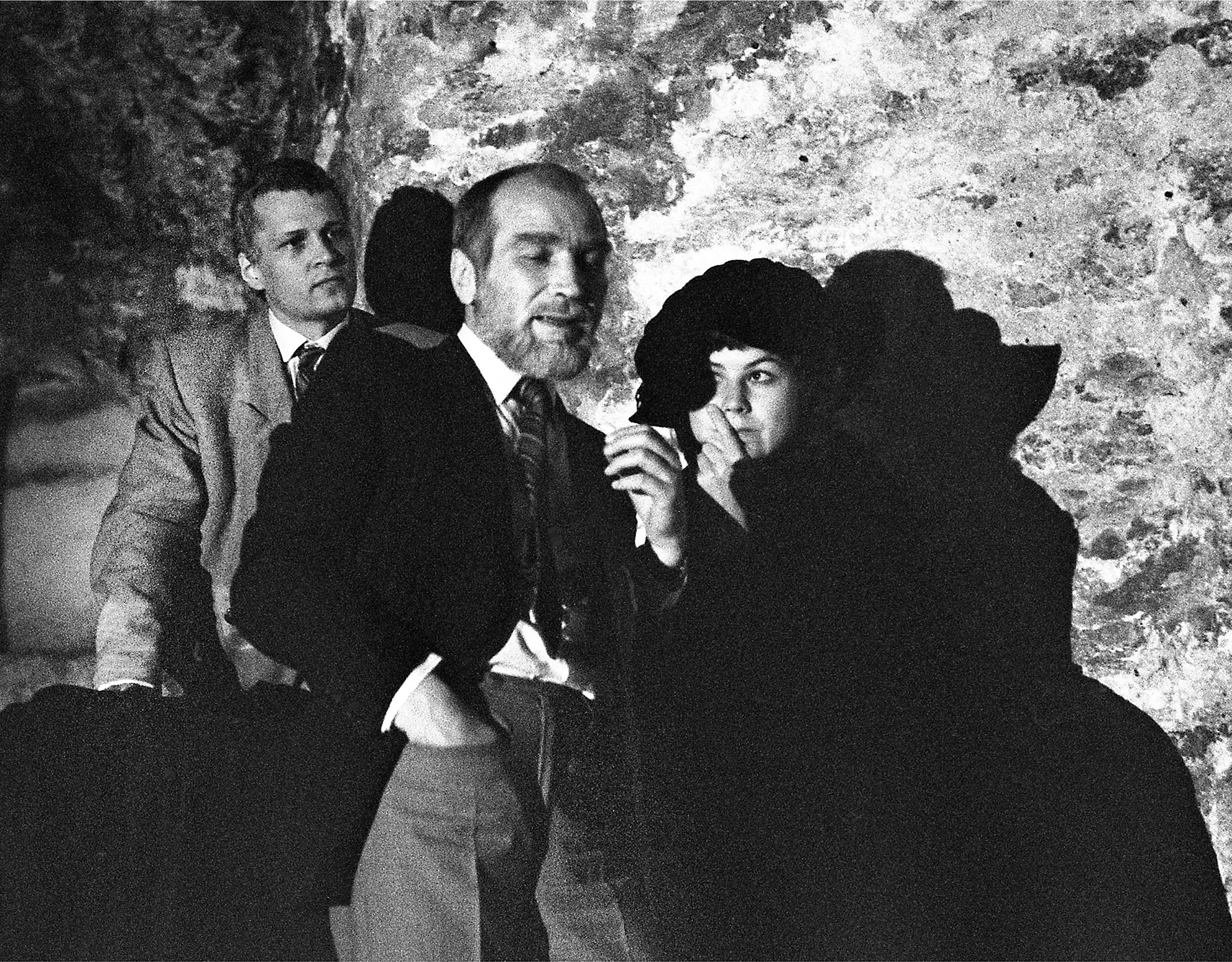 Toomas Urb, Mikk Mikiver ja Eva Vilt. XI lend 1980-1984 kursuse juhendaja Mikk Mikiver. “Heinrich IV", esiet. Kiek in de Kökis, 1983